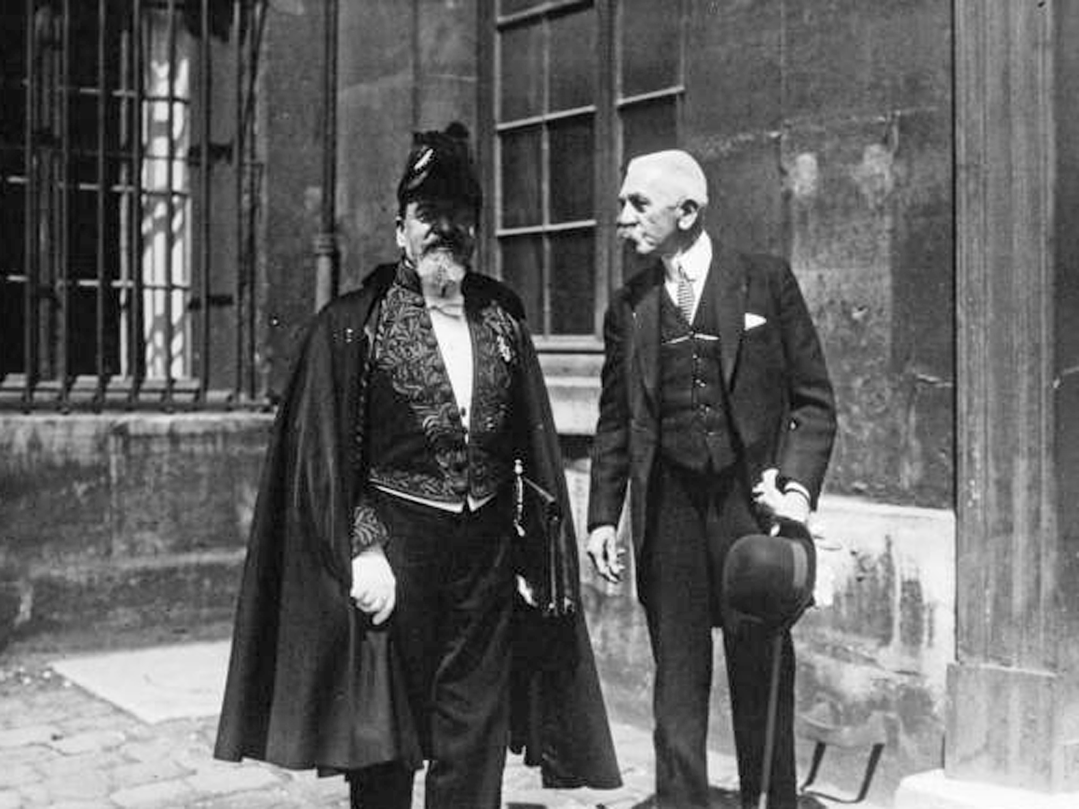 Réception de Louis Madelin à l'Académie française [photographie de presse]